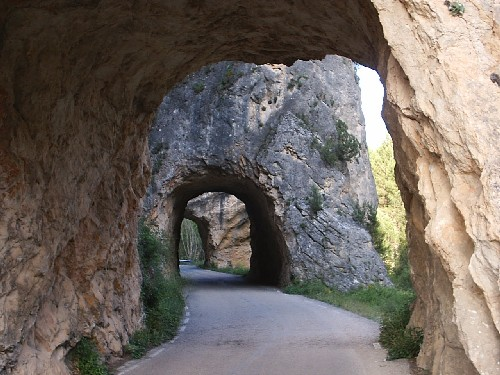 Tres túneles que dan la entrada al pueblo.